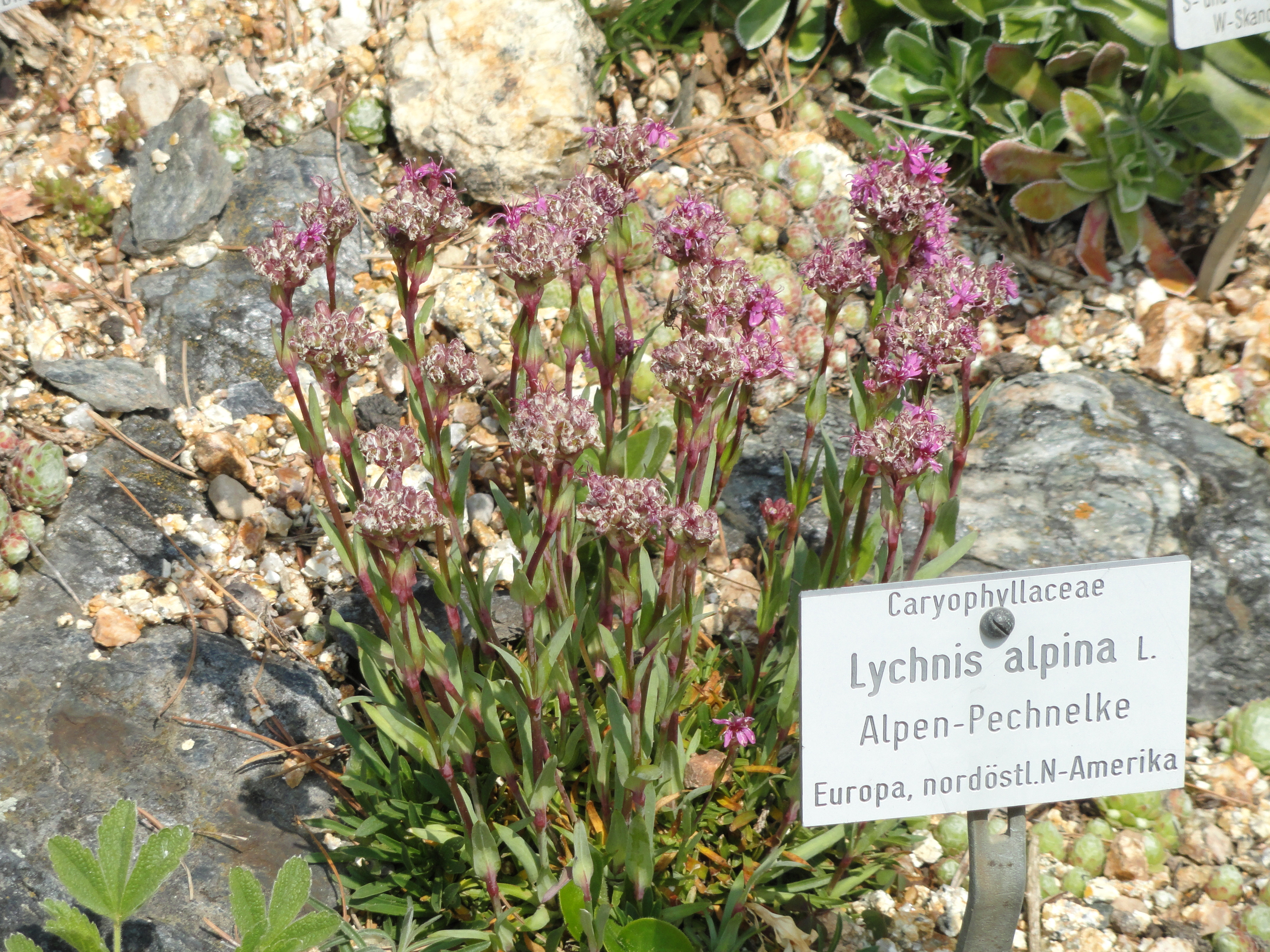 Lychnis alpina specimen in the Botanischer Garten München-Nymphenburg, Munich, Germany.